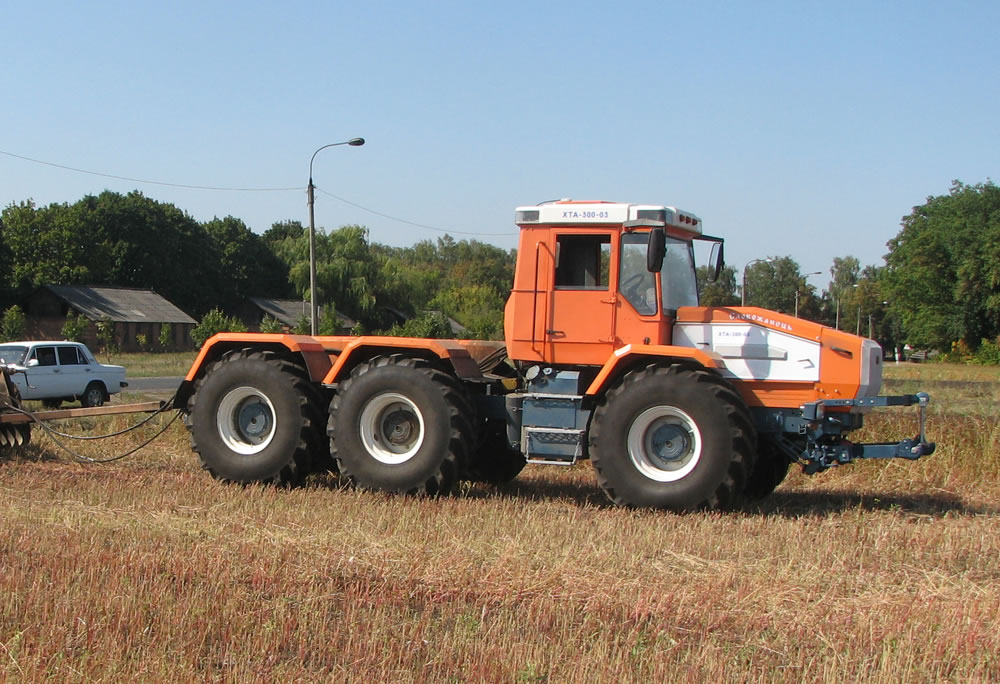 Перспективный трехосный трактор серии "Слобожанец" ХТА-300-03